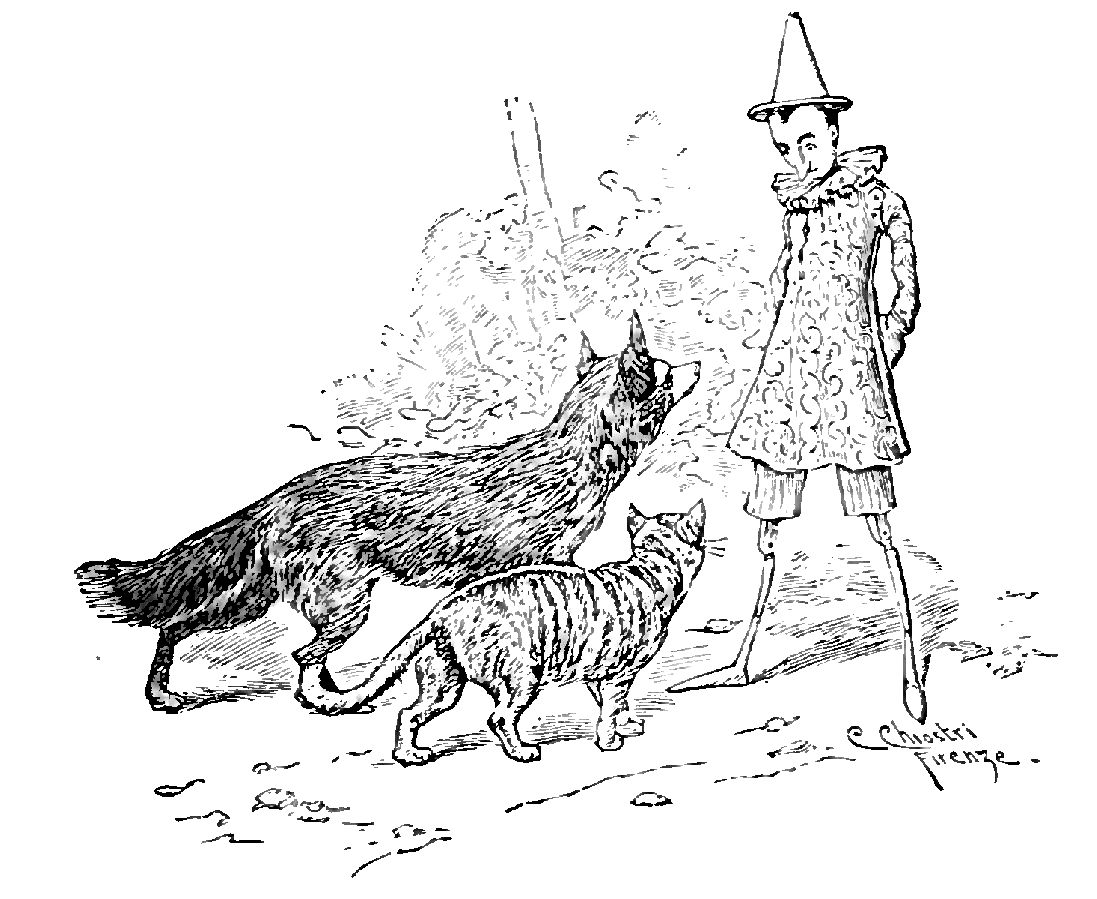 Illustrations from "Le avventure di Pinocchio, storia di un burattino", Carlo Collodi, Bemporad & figlio, Firenze 1902 (Drawings and engravings by Carlo Chiostri, and A. Bongini)